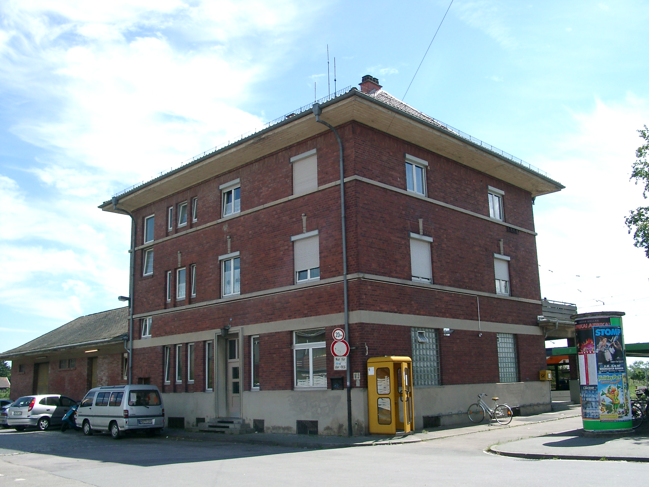 Bahnhof von Edingen-Neckarhausen, Ortsteil Edingen